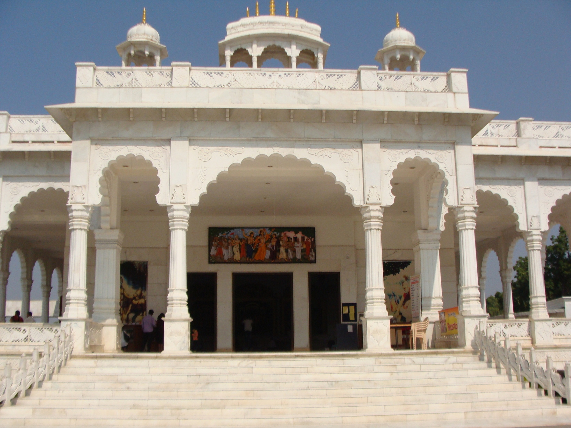 Iskon Temple Ujjain